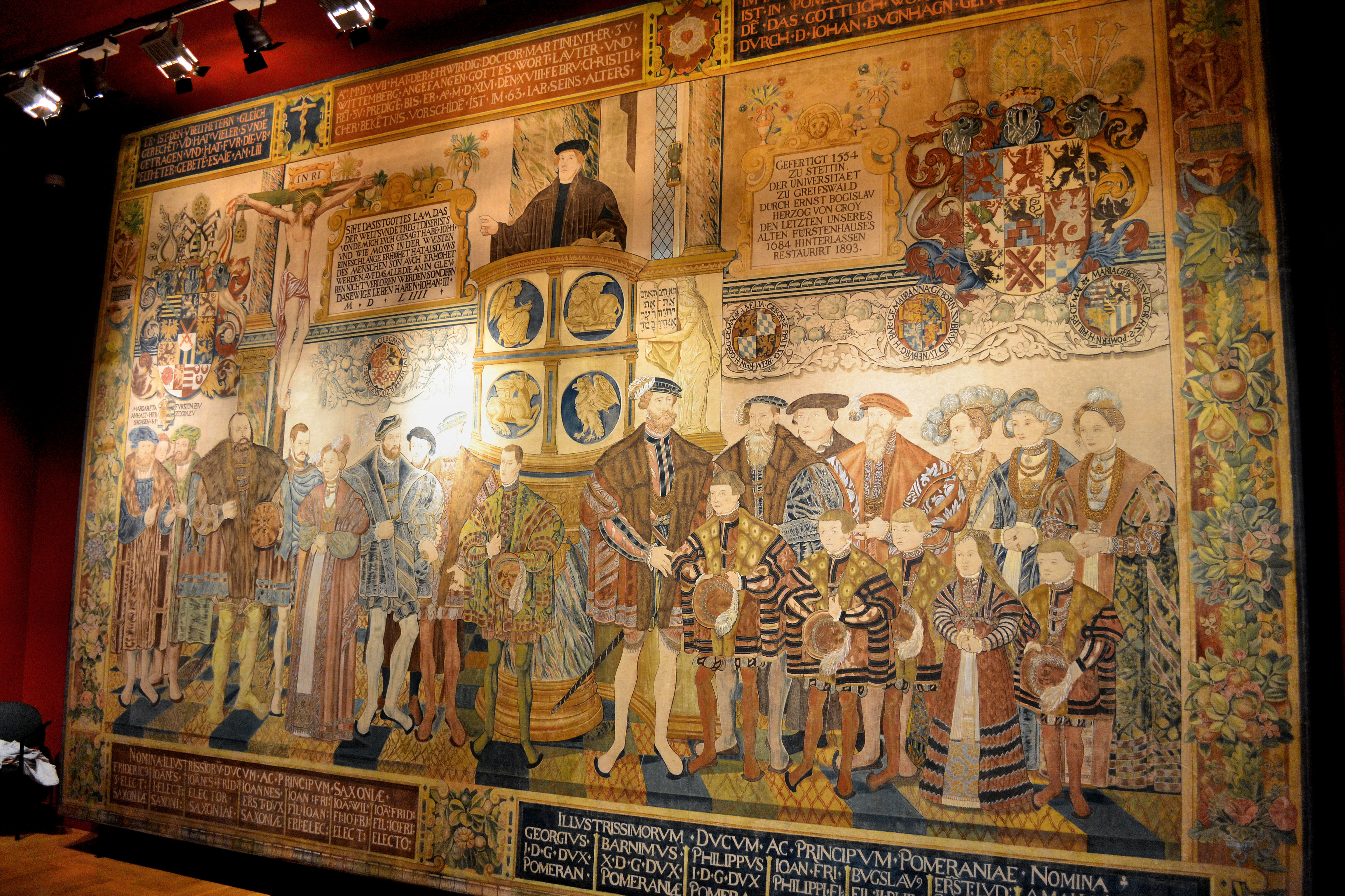 Zdjęcie kopii Opony Croya